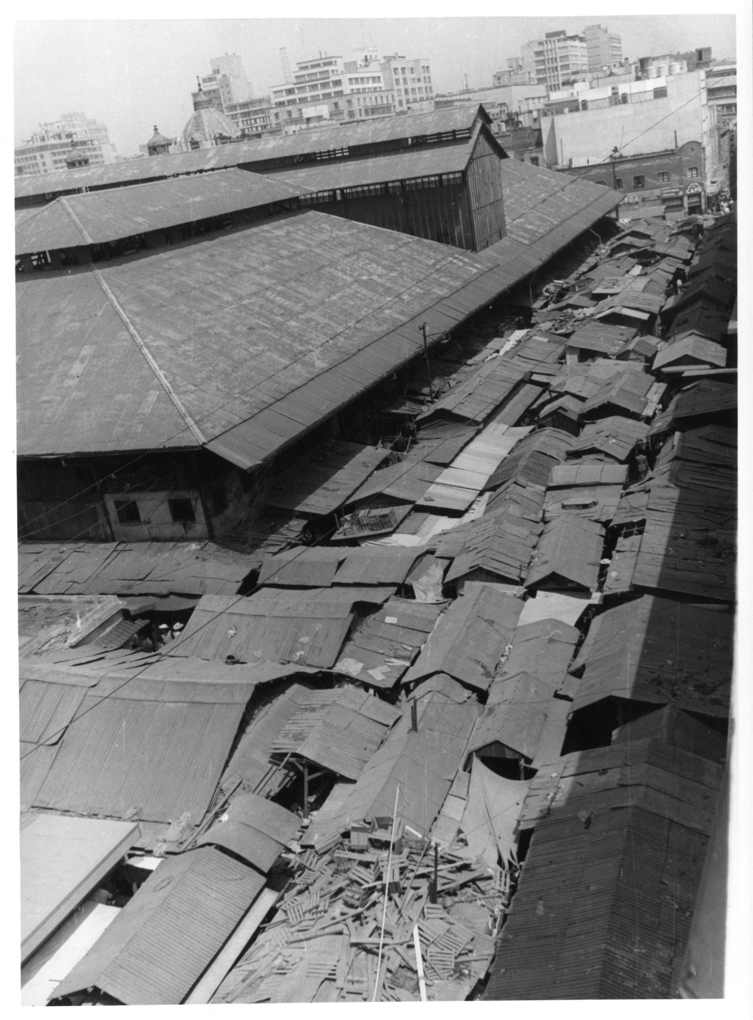 Fotografía antigua de la Ciudad de México resguardadas por el Museo Archivo de la Fotografía (MAF) de la Ciudad de México.